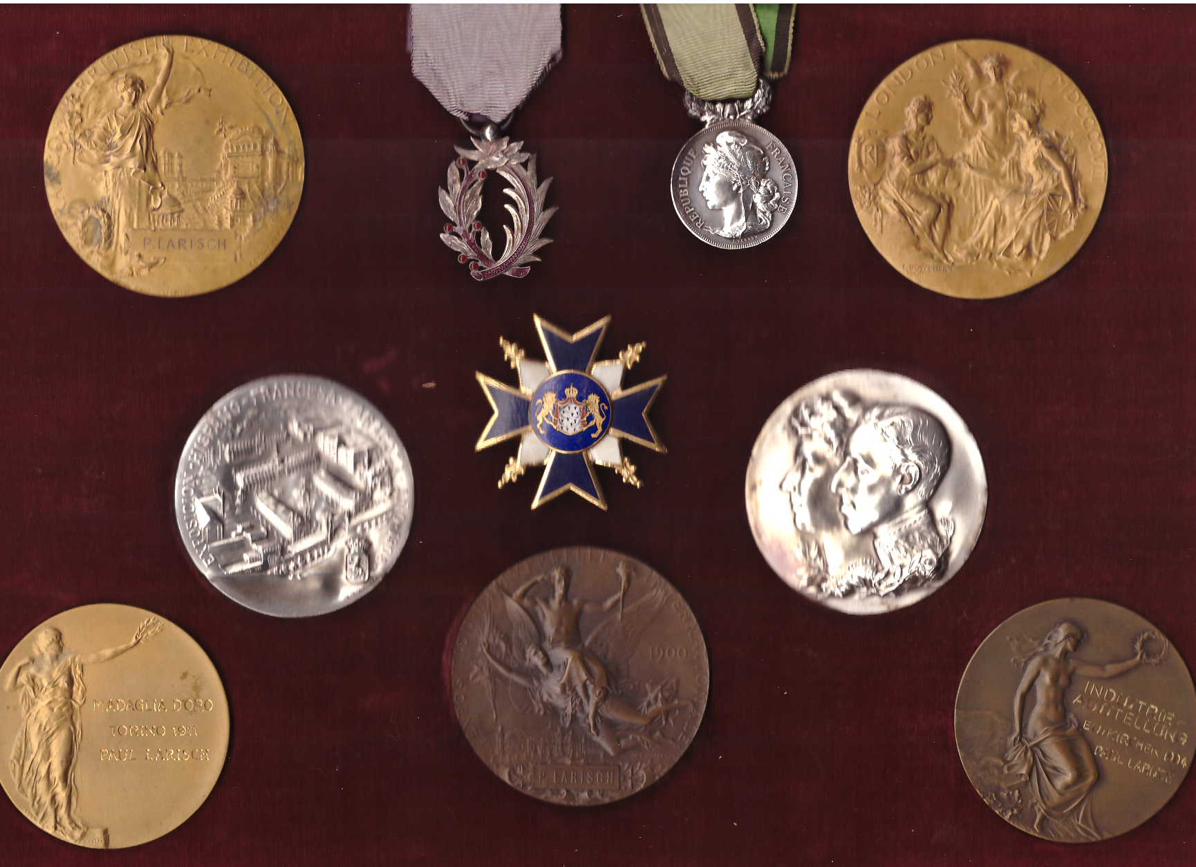 Auszeichnungen des Kürschners Paul Larisch (* 24. Mai 1870 in Frankenstein/Schlesien; † 26. September 1934 in Berlin).